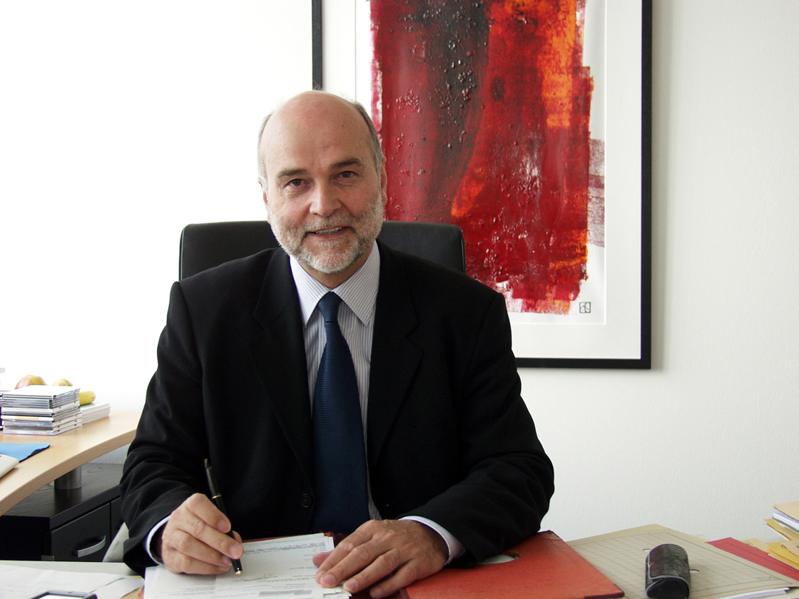 Prof. Dr. Dieter Timmermann